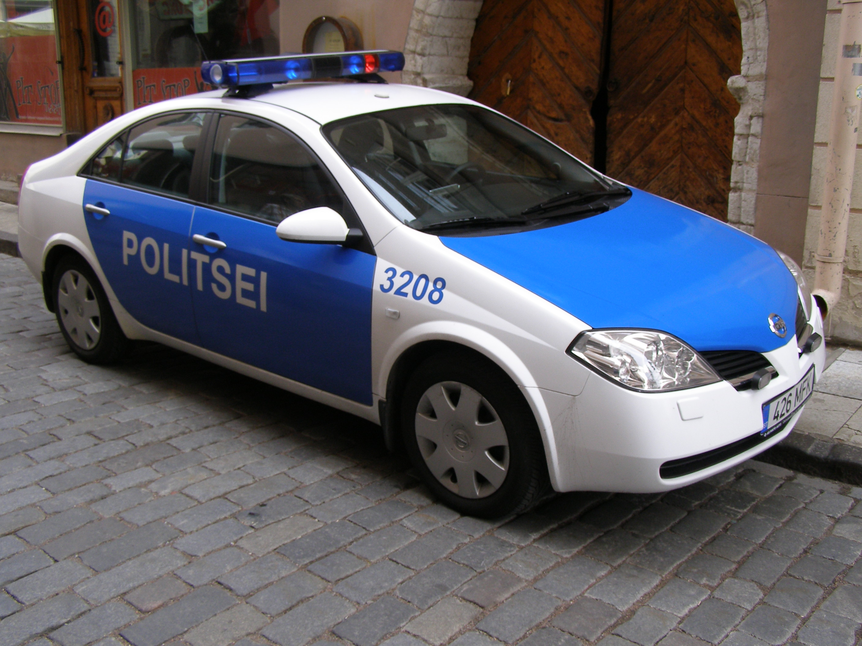 Estonian police car (in Tallinn) Estnisches Polizeiauto (in Tallinn) estonské policejní auto (v Tallinnu) voiture de police estonienne (à Tallinn)